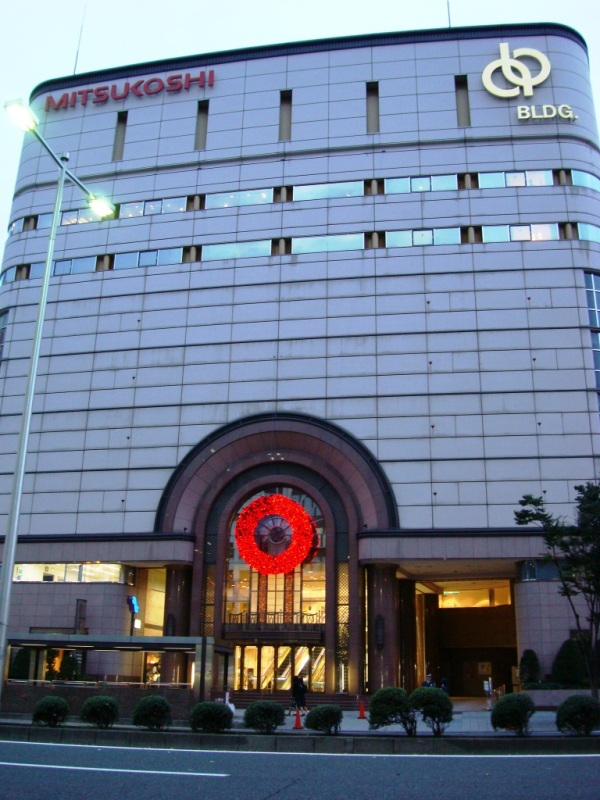 Mitsukoshi Department Store (Sendai, Japan)